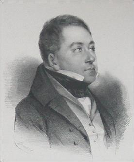 François Gaspar Ullens (1788-1853)